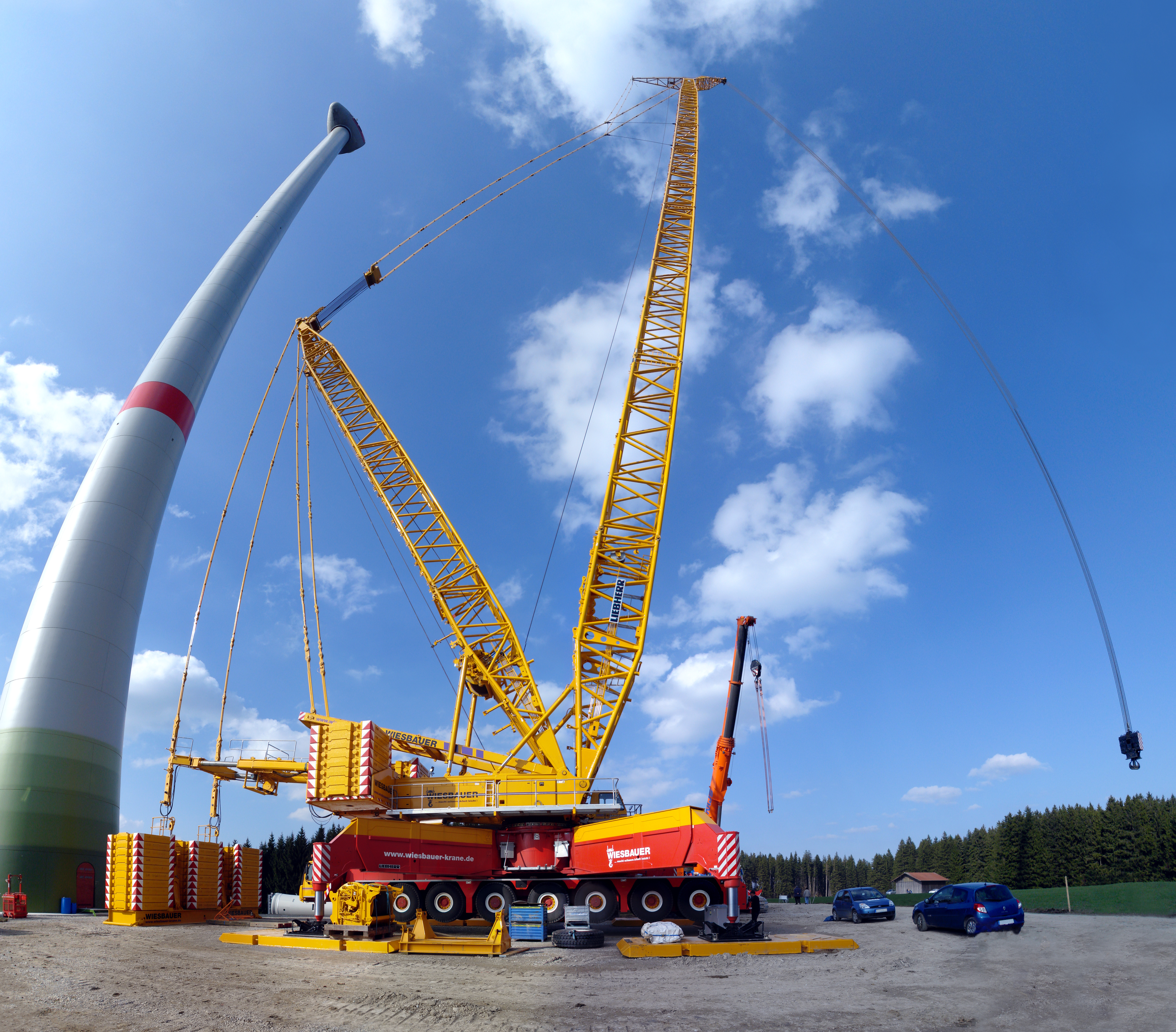 Liebherr Gittermast-Mobilkran LG1750 mit Auslegersystem SL12(14)D2FB; Seitenansicht; Aufgenommen in Königsried/Bidingen